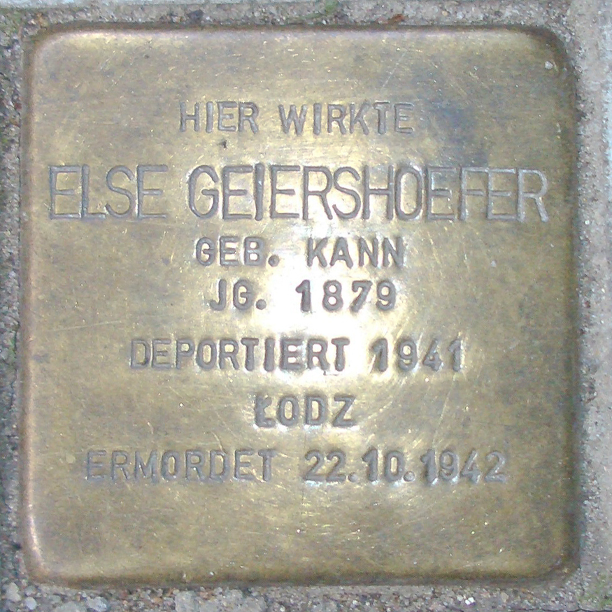 Stolperstein für Else Geiershoefer vor dem Gebäude Immenhof 10 in Hamburg-Uhlenhorst.